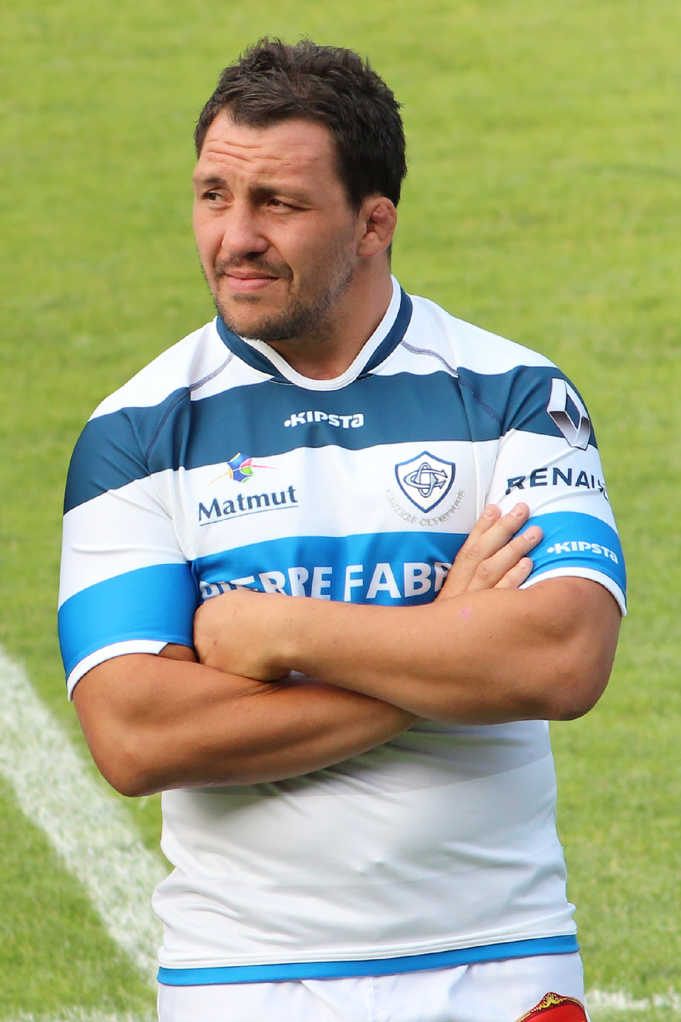 Joueurs du Castres Olympique lors de la présentation de l'équipe pour la saison 2015-2016